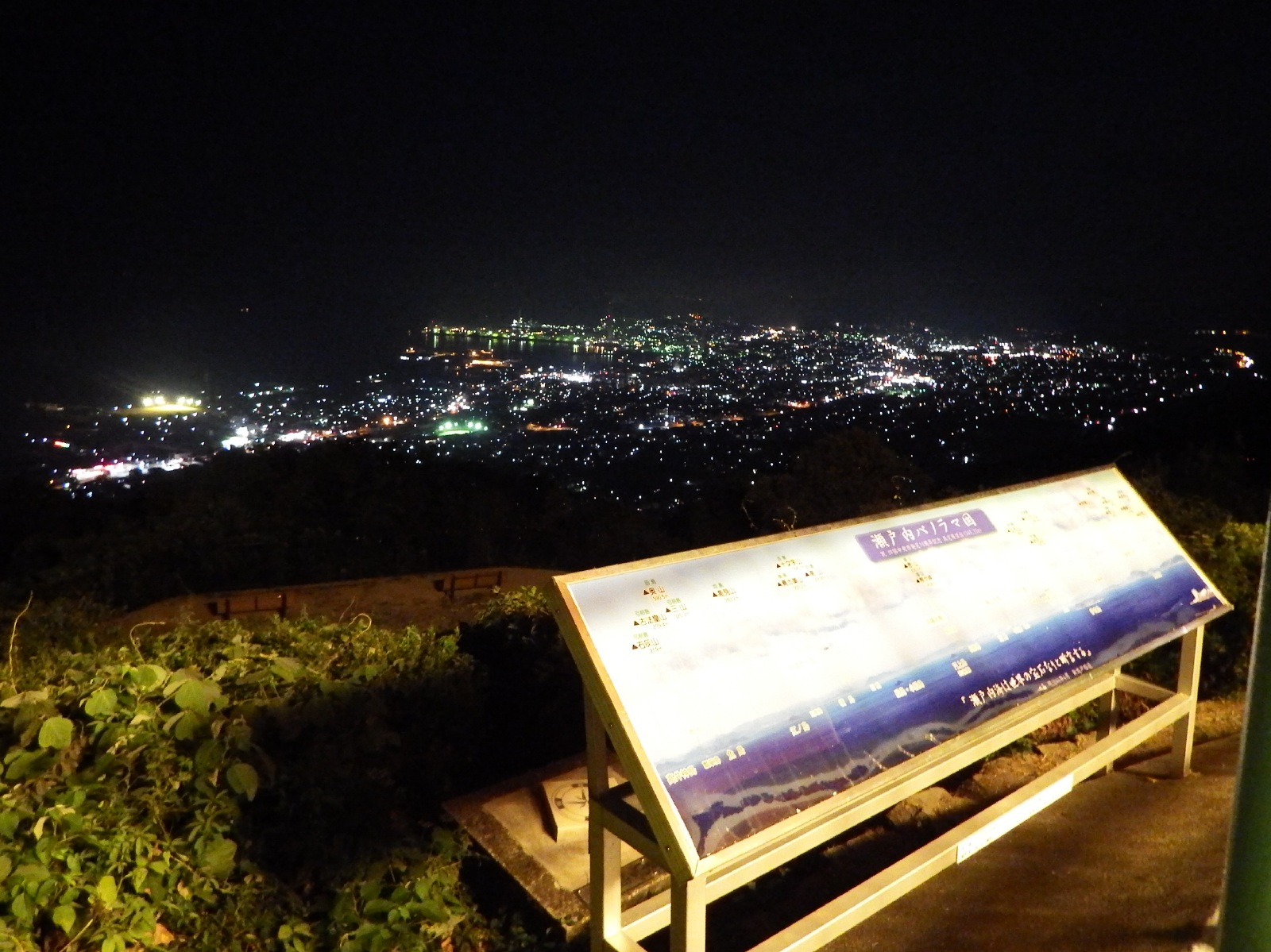 具定展望台からの夜景